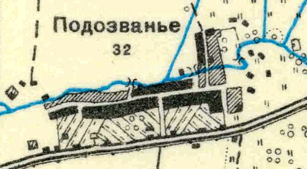 Топографическая карта Ленинградской области, квадрат О-35-11-В-в (Копорье), деревня Подозванье